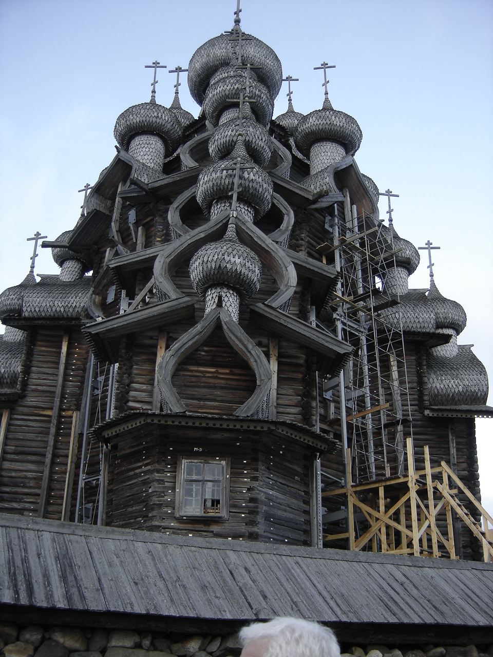 Eglise_d'été_2_Kiji